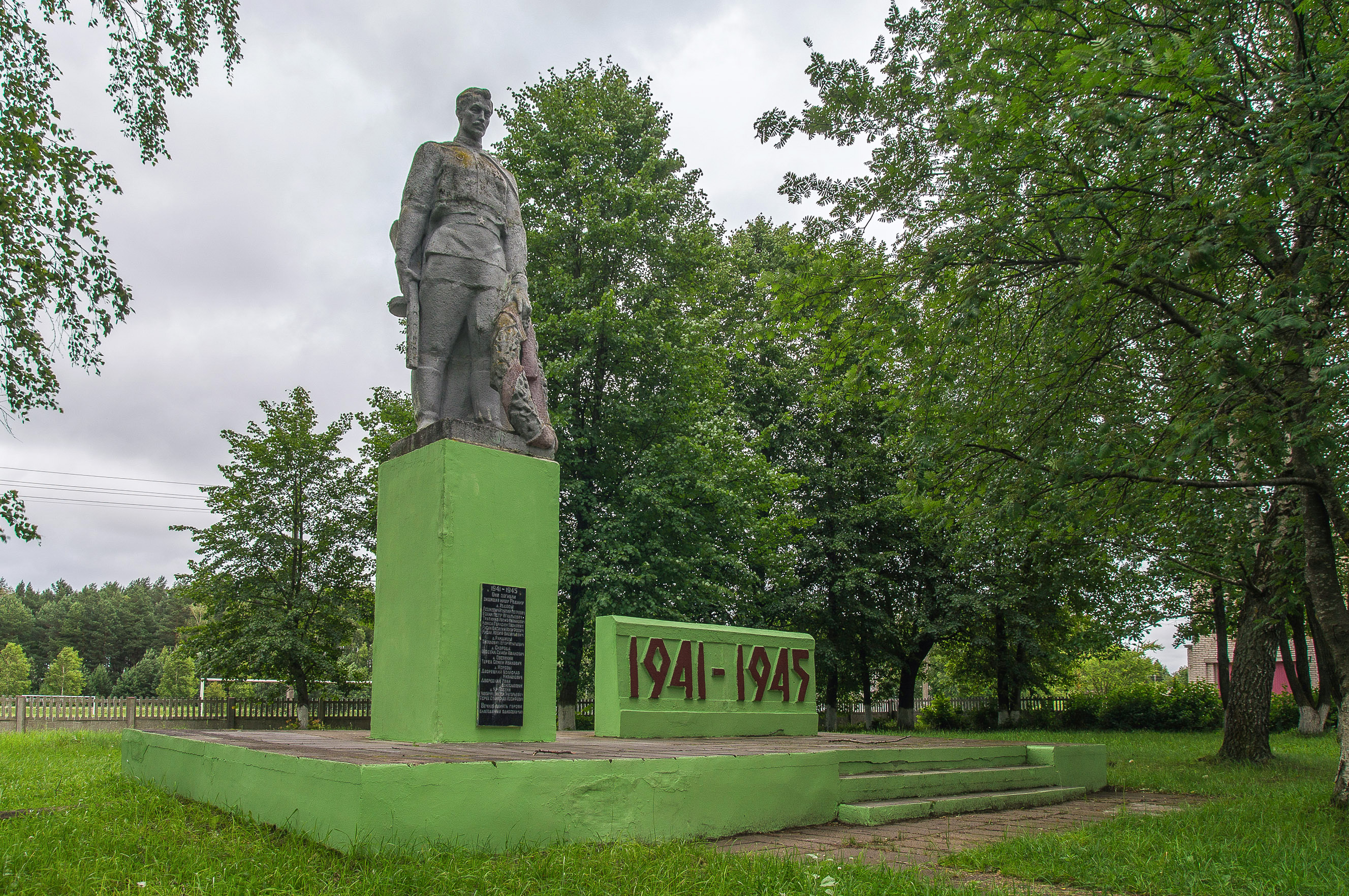 На ўшанаванне памяці 31 земляка, якія загінулі ў Другую сусветную вайну, у 1974 годзе пастаўлены помнік - скульптура воіна з аўтаматам.